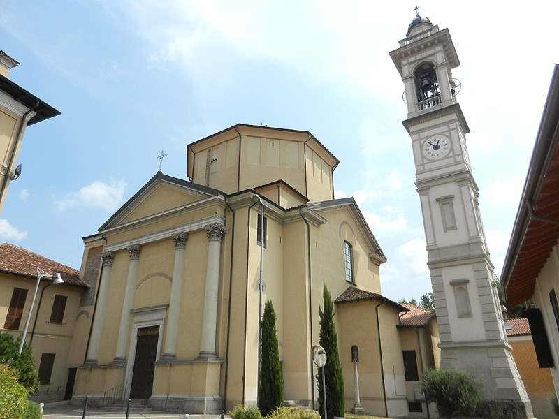 Masate - Chiesa Parrocchiale di S. Giovanni Evangelista